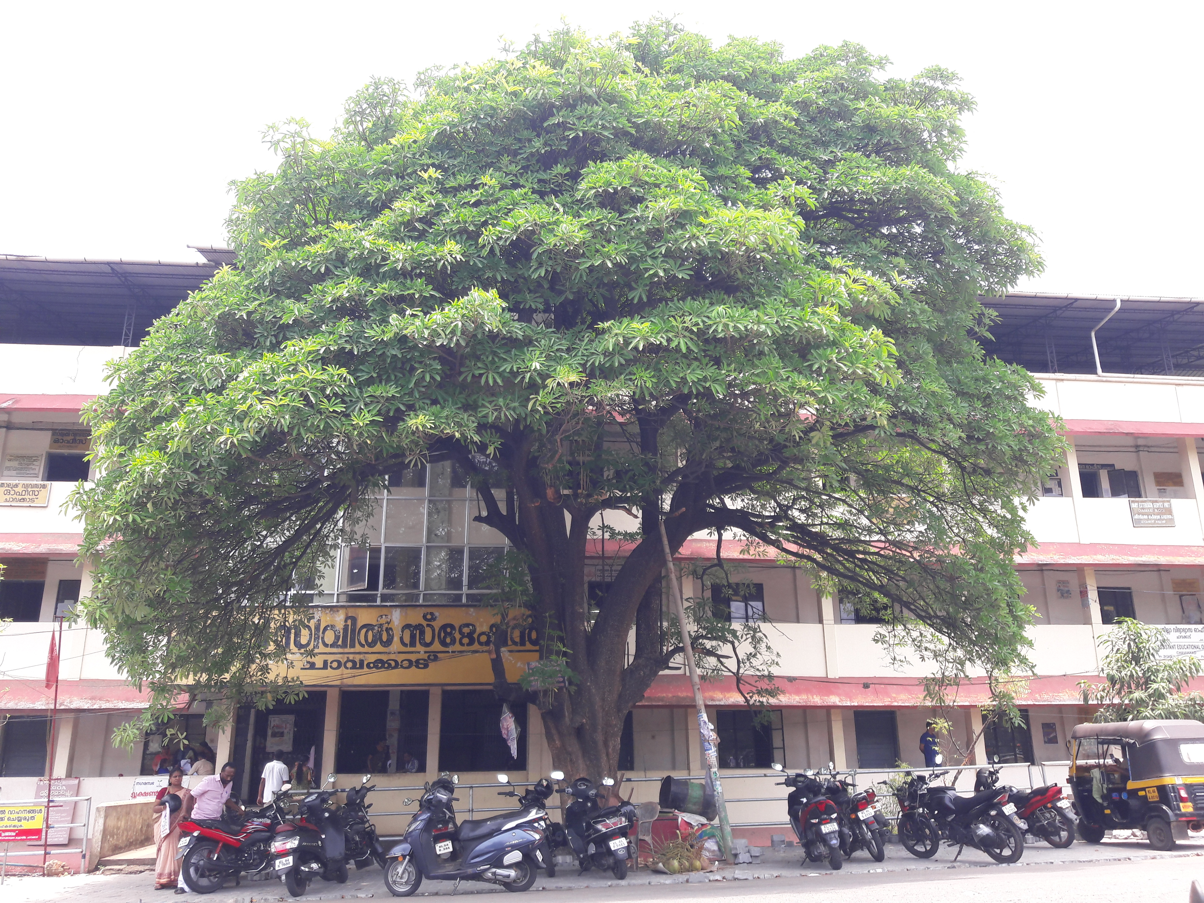 തൃശൂര്‍ ജില്ലയിലെ ചാവക്കാട് മിനി സിവില്‍ സ്റ്റേഷന് മുമ്പിലുള്ള ഒരു ഏഴിലംപാല. Devil tree ശാസ്ത്രീയ നാമം Alstonia scholaris കുടുംബം Apocynaceae.